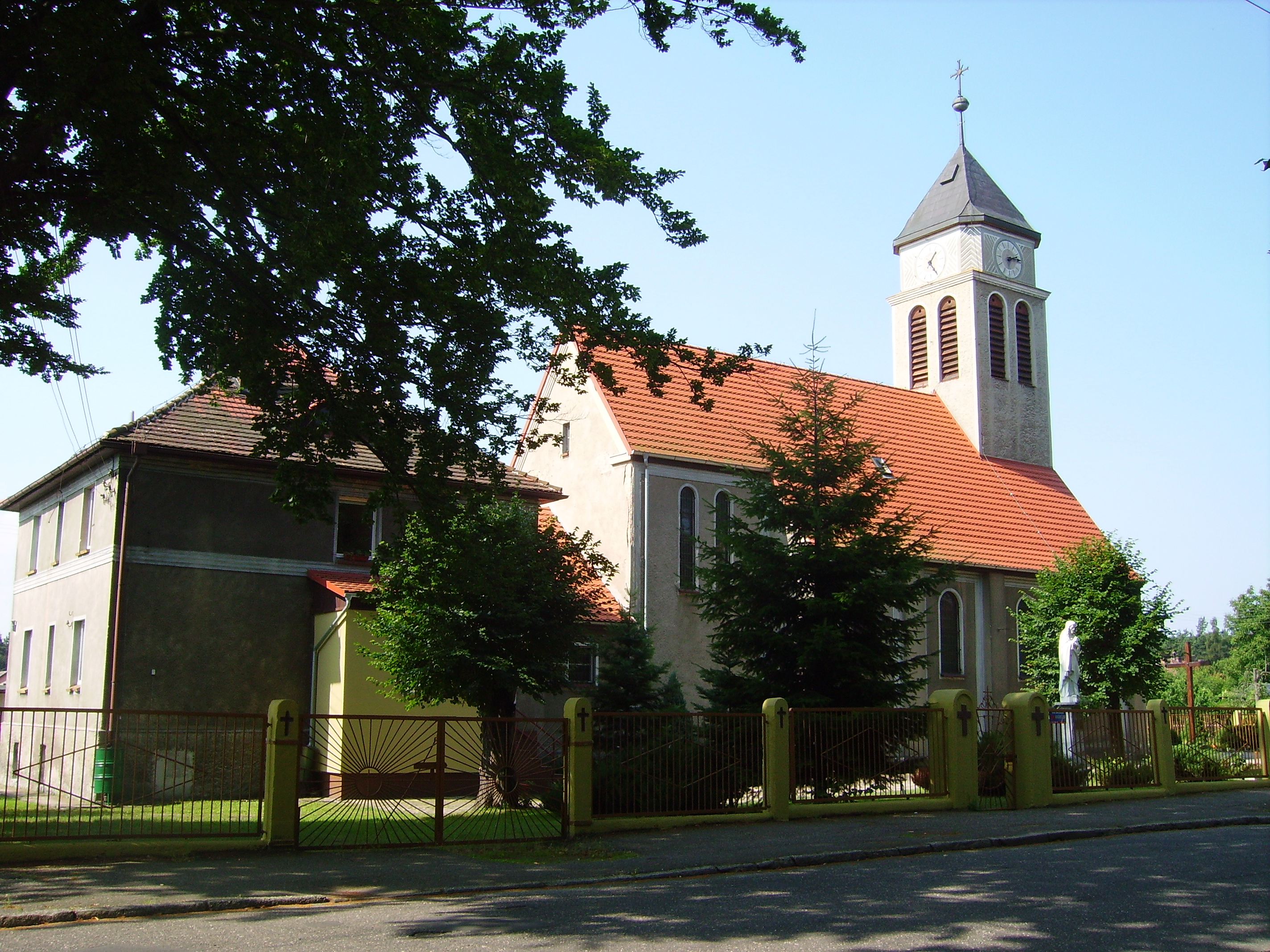 kościół parafialny pw. Najświętszego Serca Pana Jezusa, neoromański z 1930 r w Węglińcu widok od ulicy